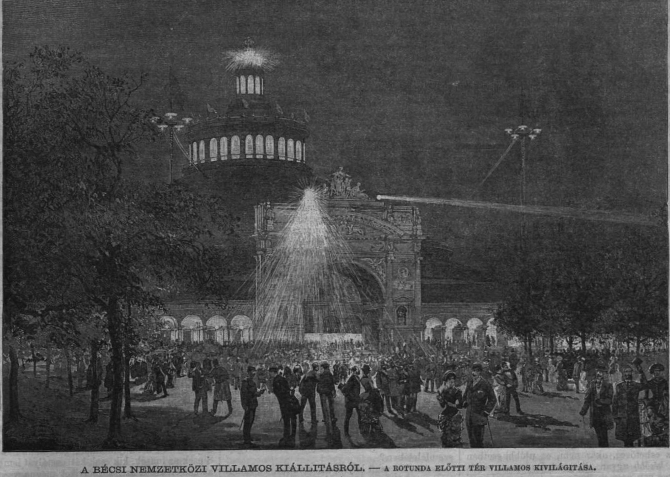 Az 1883-as villamossági kiállítás Bécsben